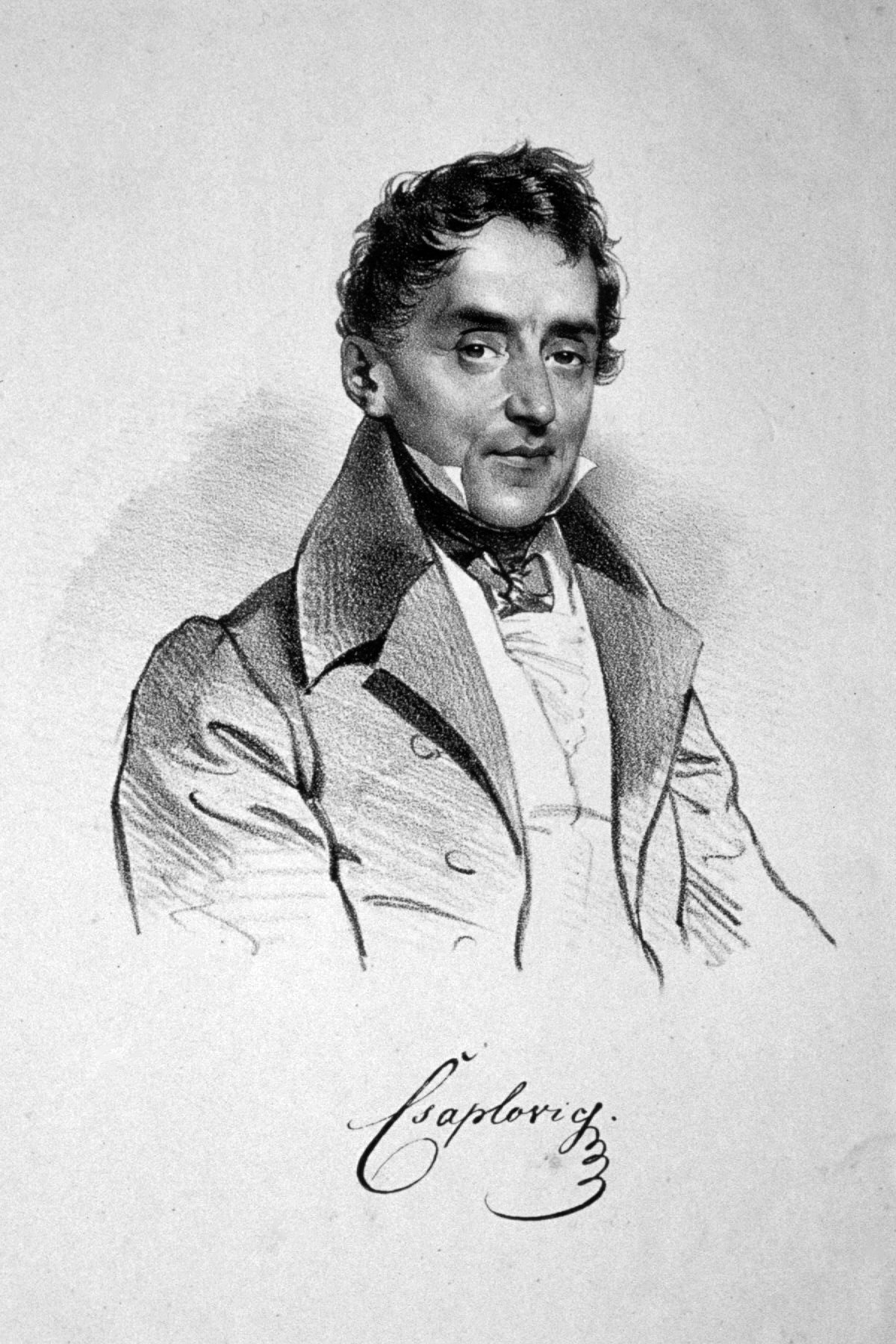 Johann Csaplovics, Edler von Jeszenova (1780-1847), Topograph, Rechtgelehrter. Lithographie von Josef Kriehuber